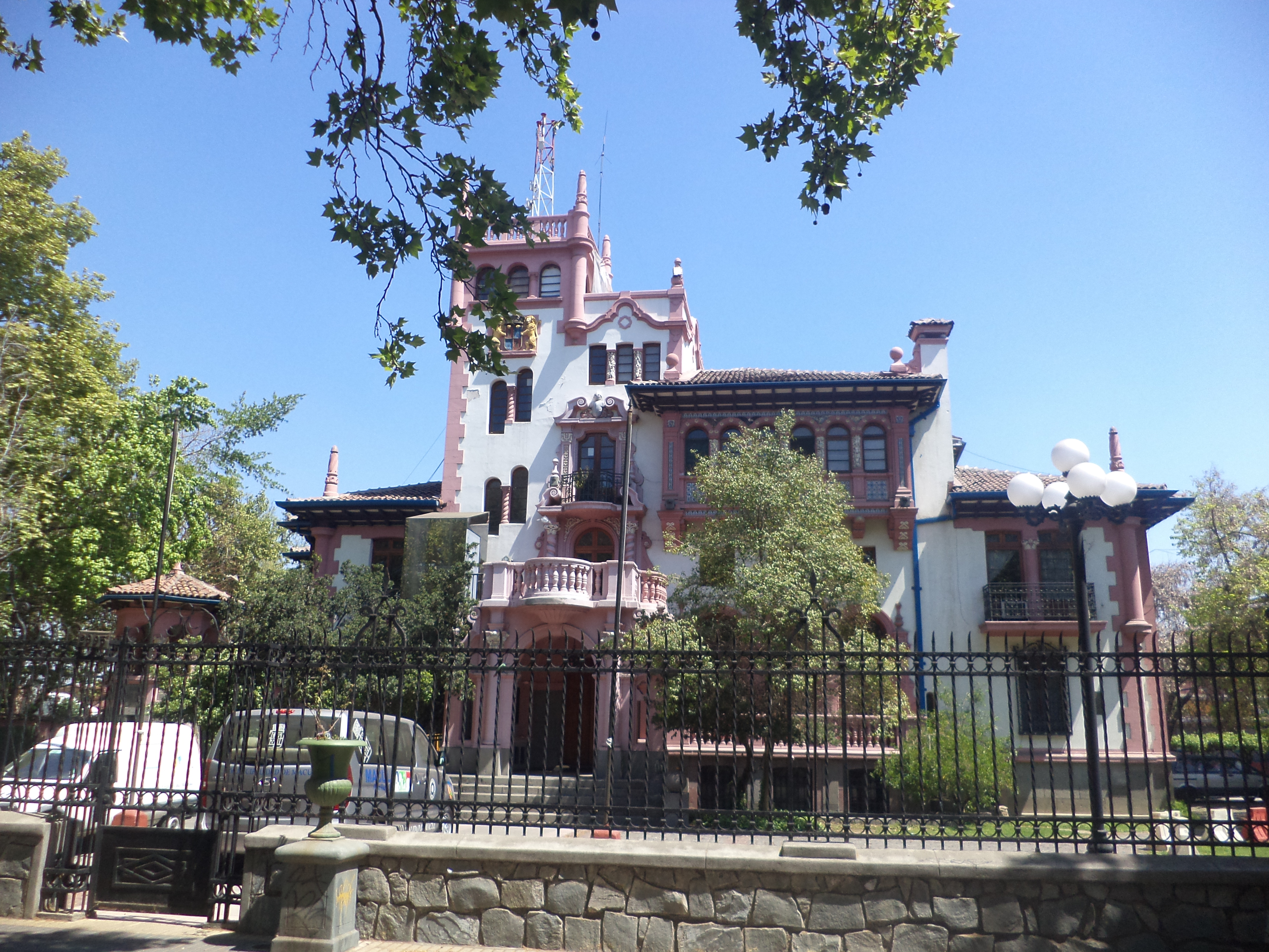 Municipalidad de Macul (Ex Palacio Vásquez), Santiago de Chile.